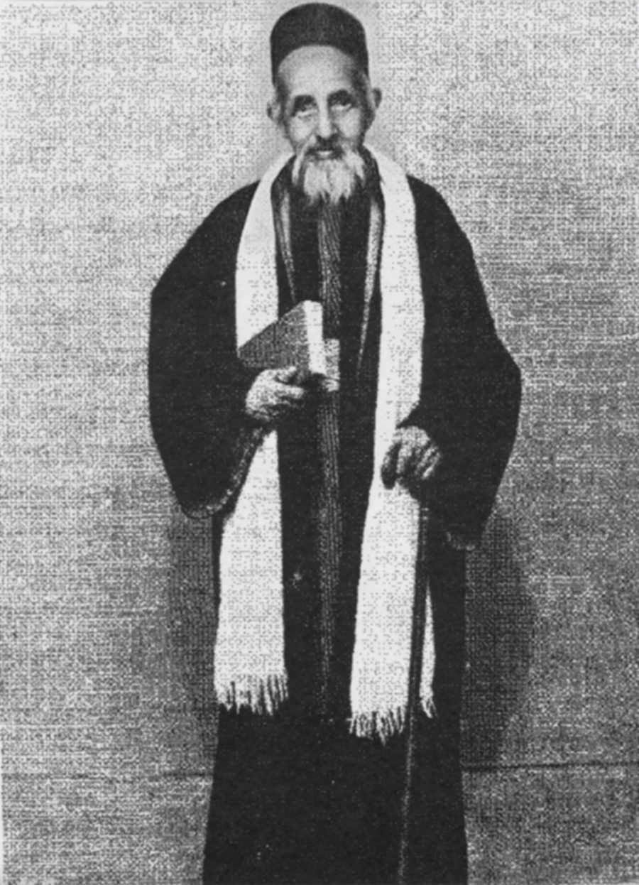 הרב שלום אלשיך